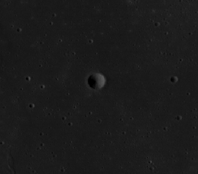 Cráter lunar Hornsby. (Imagen LRO)